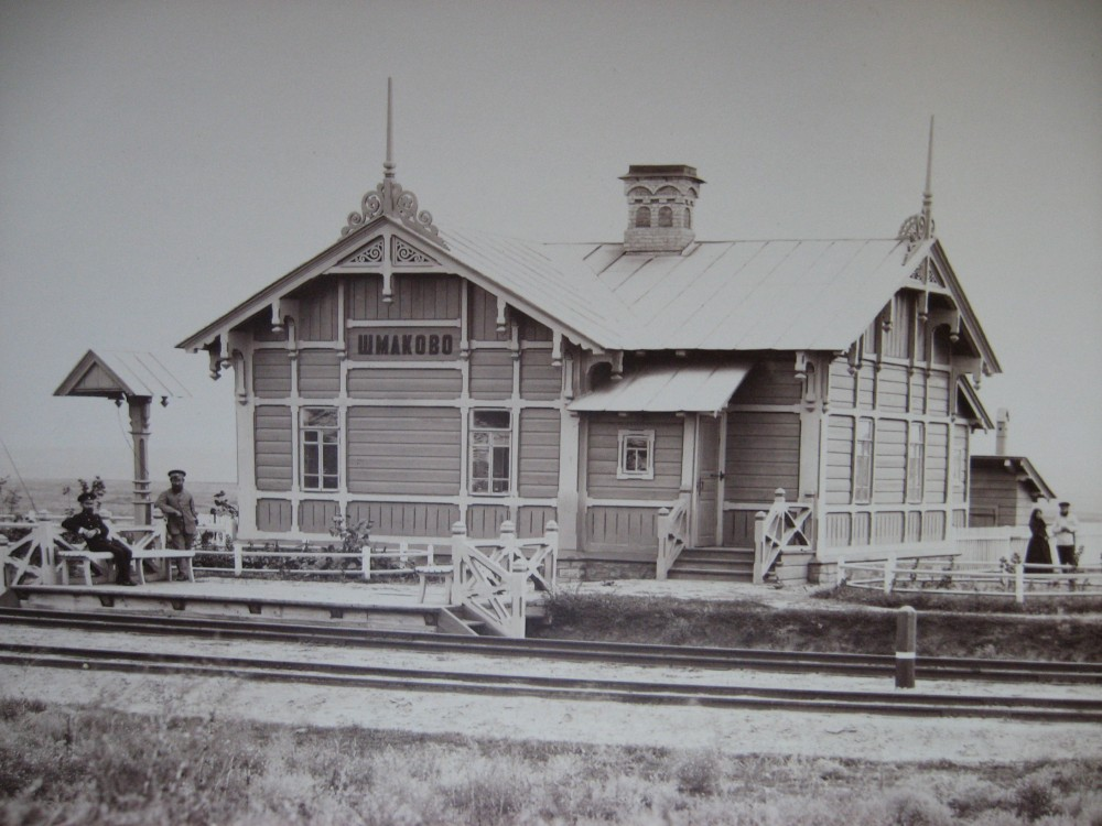 Путевой пост Шмаково. Екатерининская железная дорога. Саксаганская ветвь. 1893 год